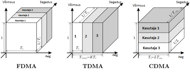 Joonis 3 FDMA, TDMA ja CDMA graafiline võrdlus sõltuvalt ajast, signaali võimsusest ning sagedusest